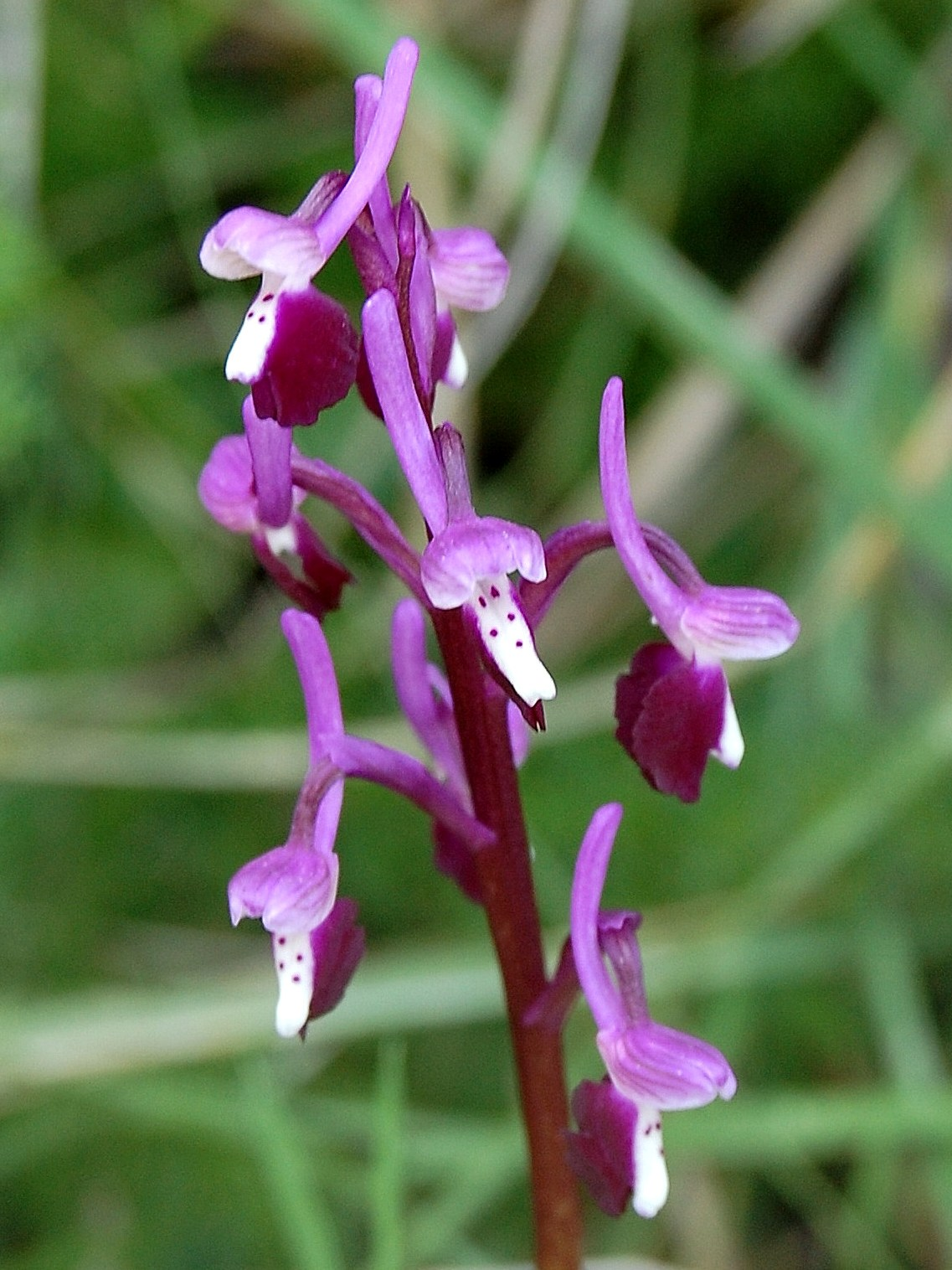 Orchis longicornu Riserva dello Zingaro